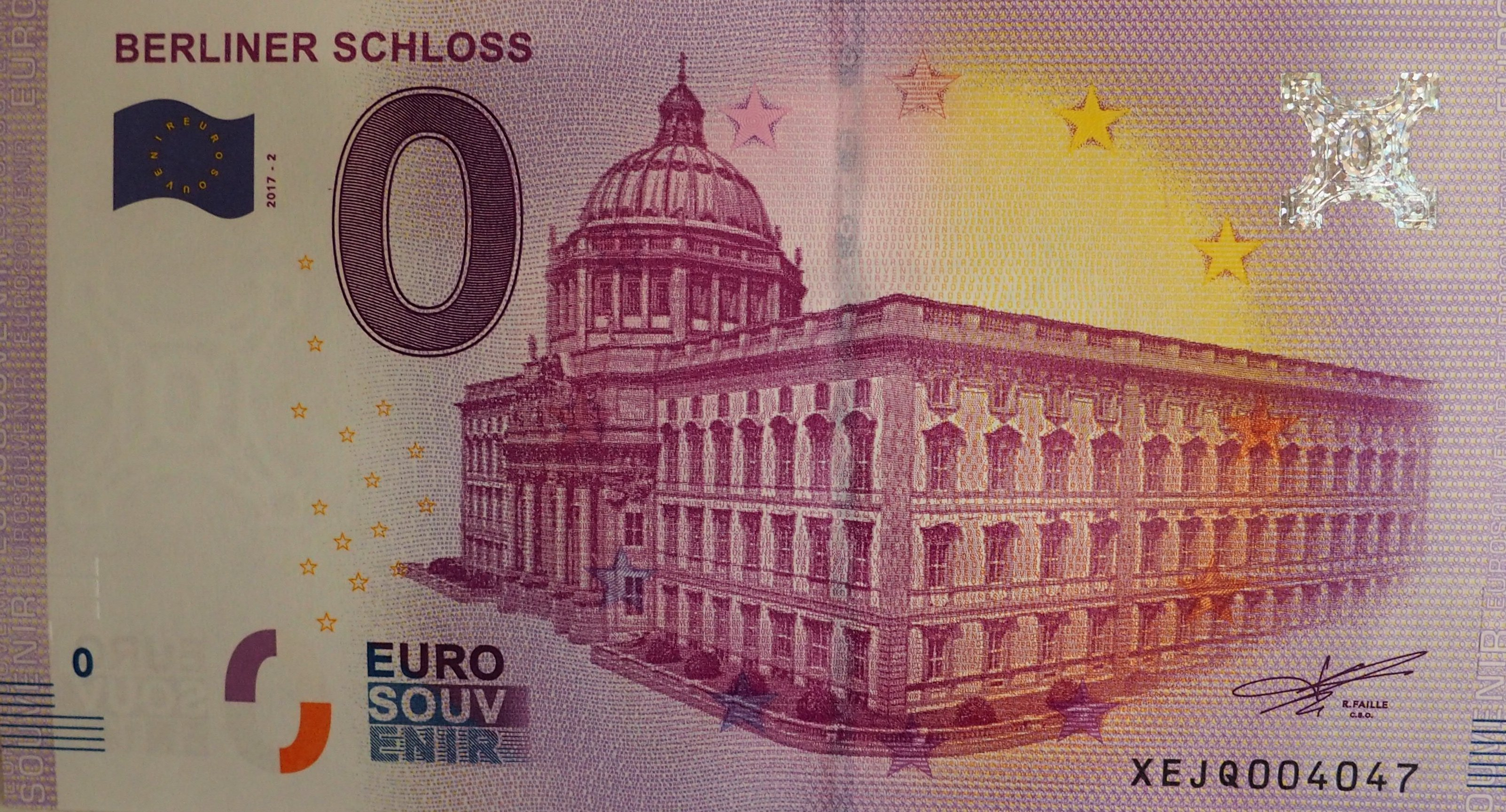 0-Euro-Schein Motiv Berliner Schloss (2017)